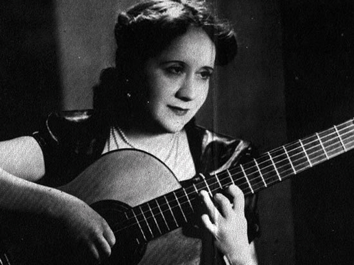 Fotografia posant de jove